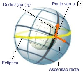 Coordenadas horizontais de um astro.